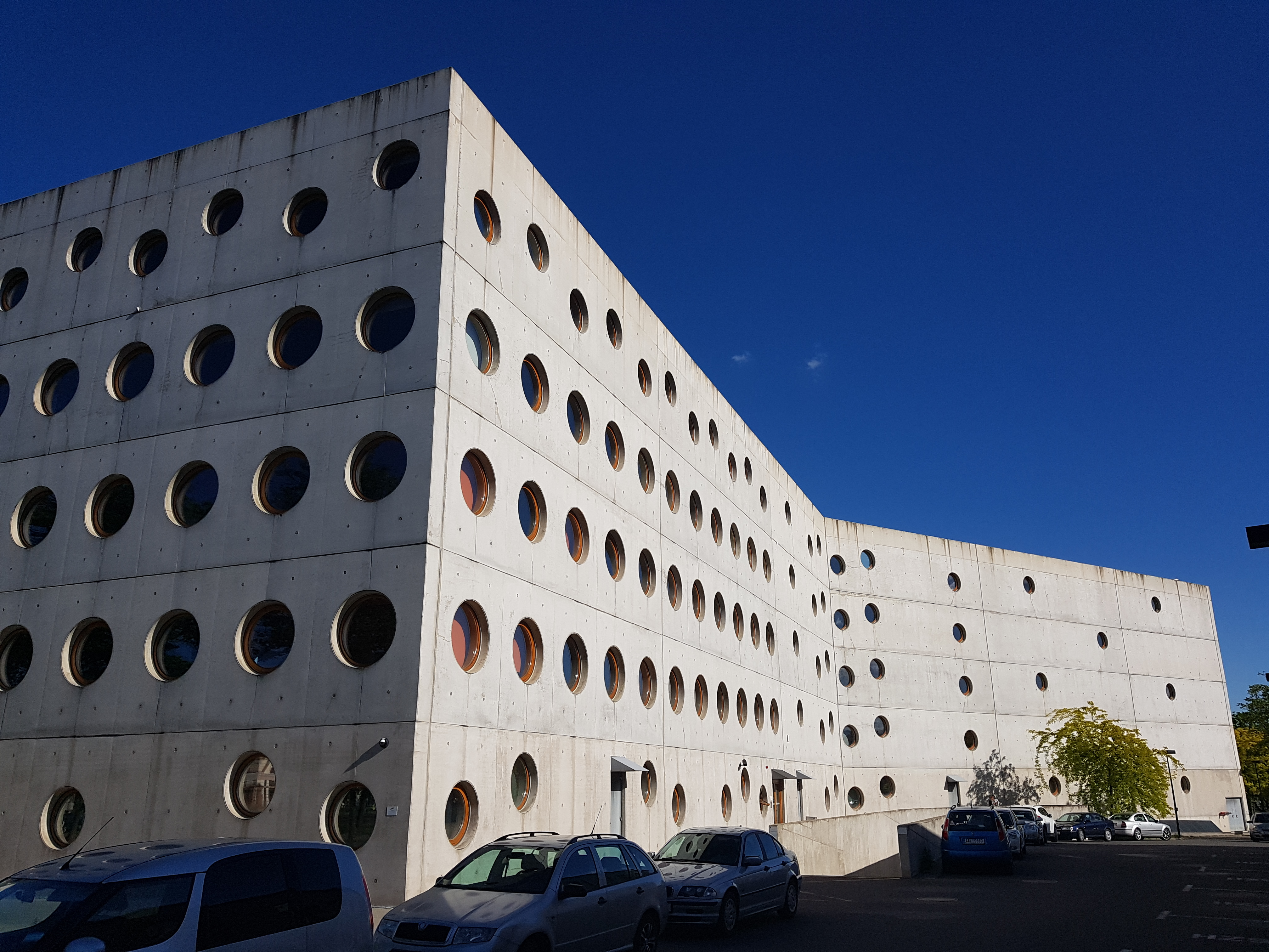 Studijní a vědecká knihovna Hradec Králové